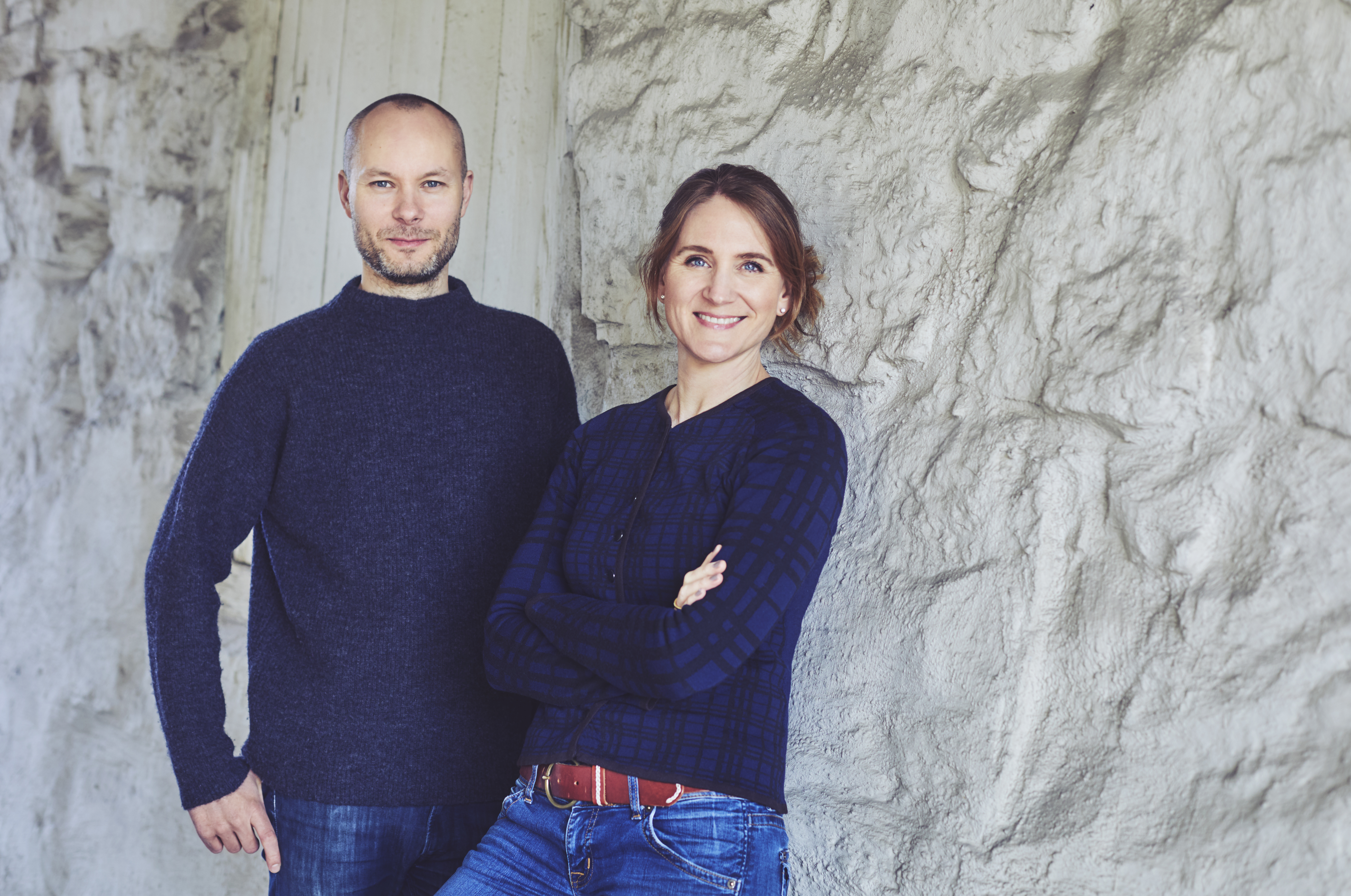 Olle Christer Stenby og Christel E. Wigen Grøndahl utgjør redaksjonen i Bygg og Bevar. Foto: Cathrine Dokken, Kreativ Strek